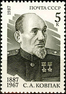 Почтовая марка СССР - Ковпак Сидор Артемьевич, Дважды Герой Советского Союза